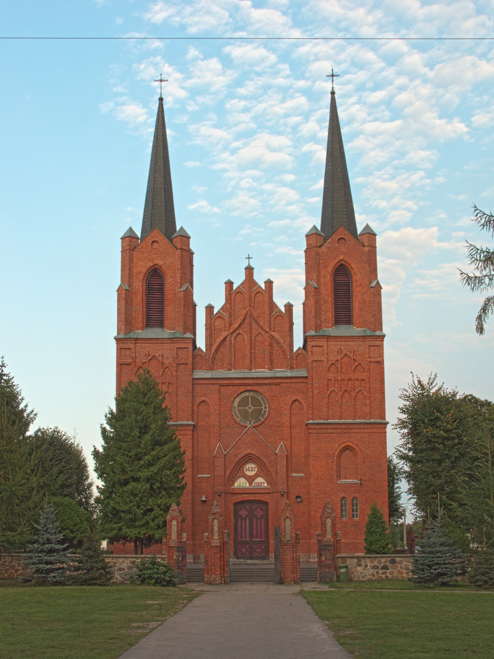 Kościół parafialny pw. św. Andrzeja Apostoła w Wyszkach